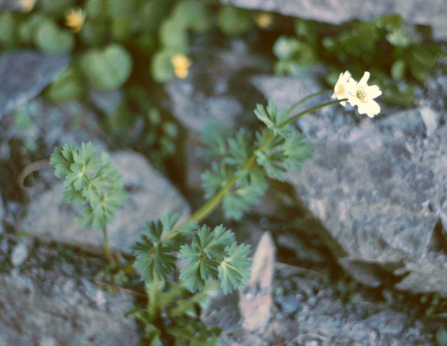 Korianderblatt-Schmuckblümchen (Callianthemum coriandrifolium), Hahnenfußgewächse (Ranunculaceae) - Österreich/Austria/Autriche: Kärnten, Gurktaler Alpen, Wintertaler Nock